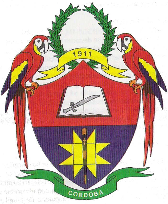 Escudo del municipio de Córdoba, Nariño (Colombia)